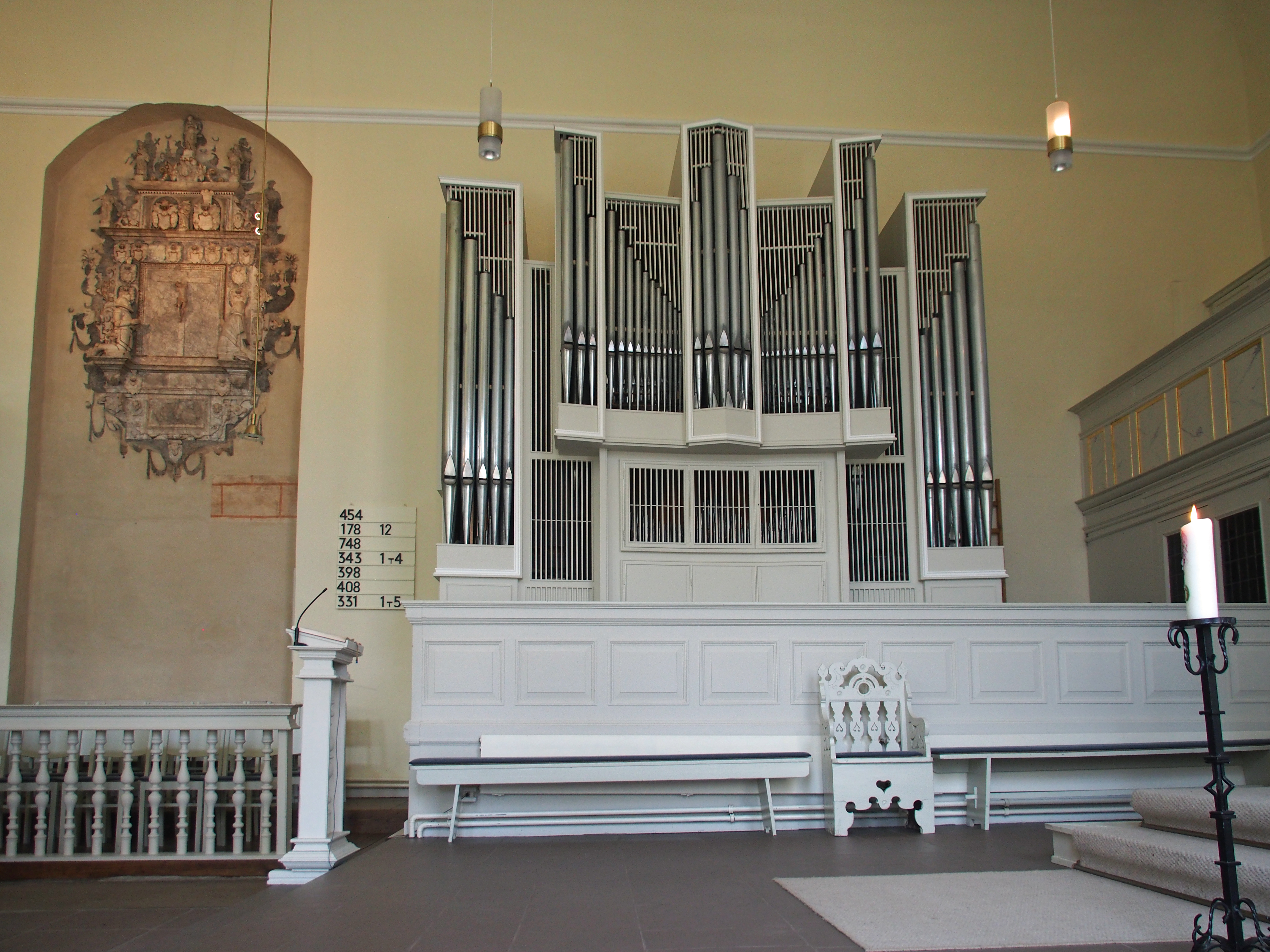 Orgel der Orgelbaufirma Emil Hammer aus Arnim in der St. Marien-Kirche Wienhausen (von 1956)